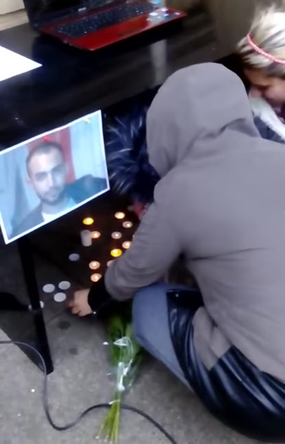 Lidé zapalují svíčky